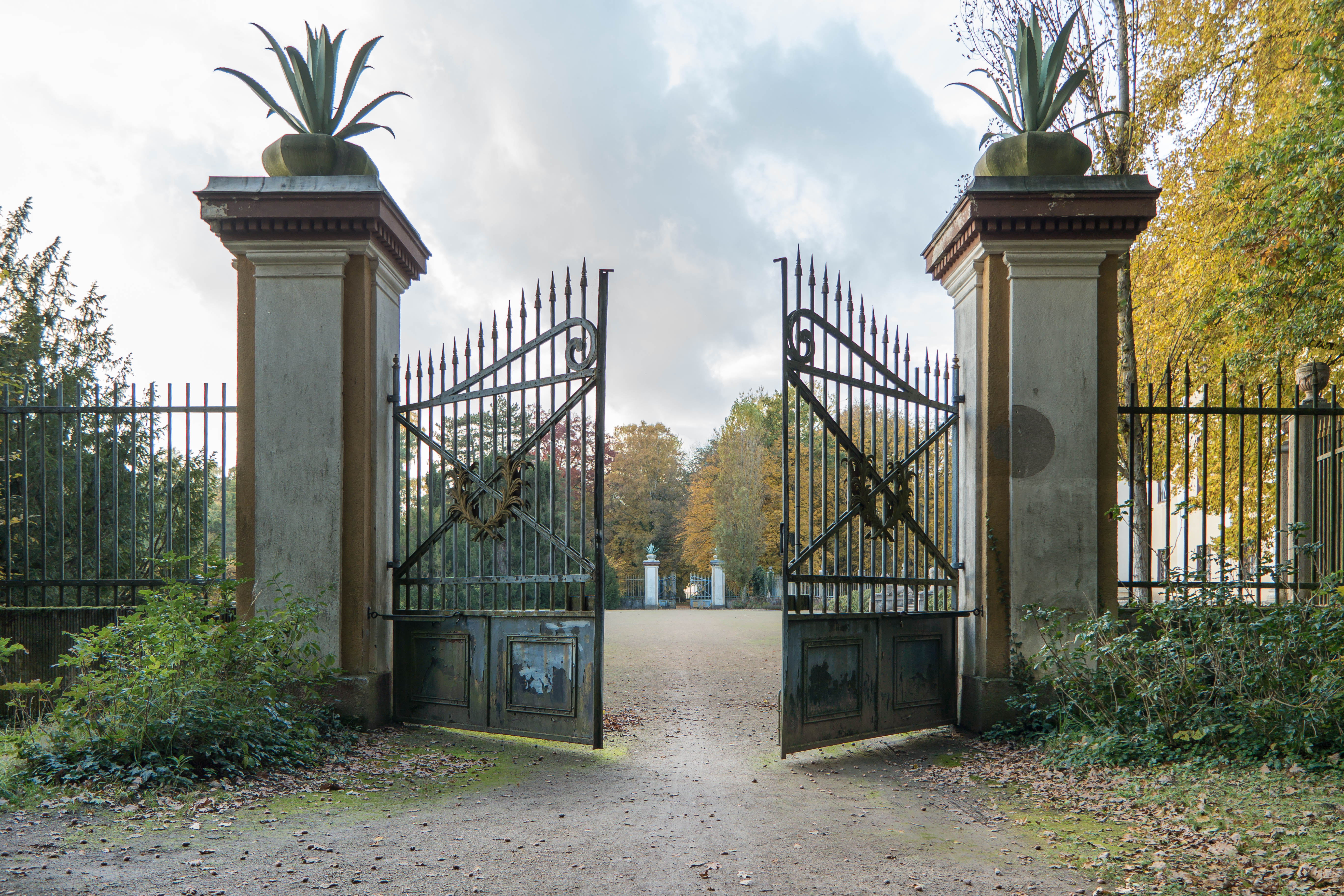 Portal am Neuen Schloss im Stadtpark von Tangerhütte